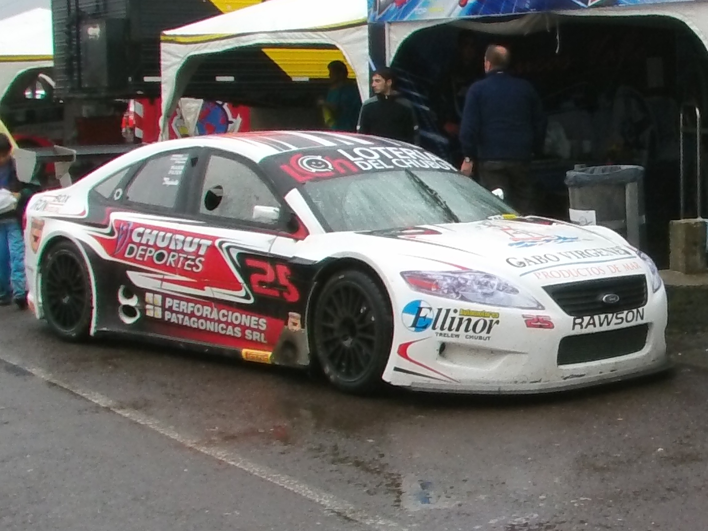 Ford Mondeo III de la categoría Top Race Series. Piloto: Lucas Valle